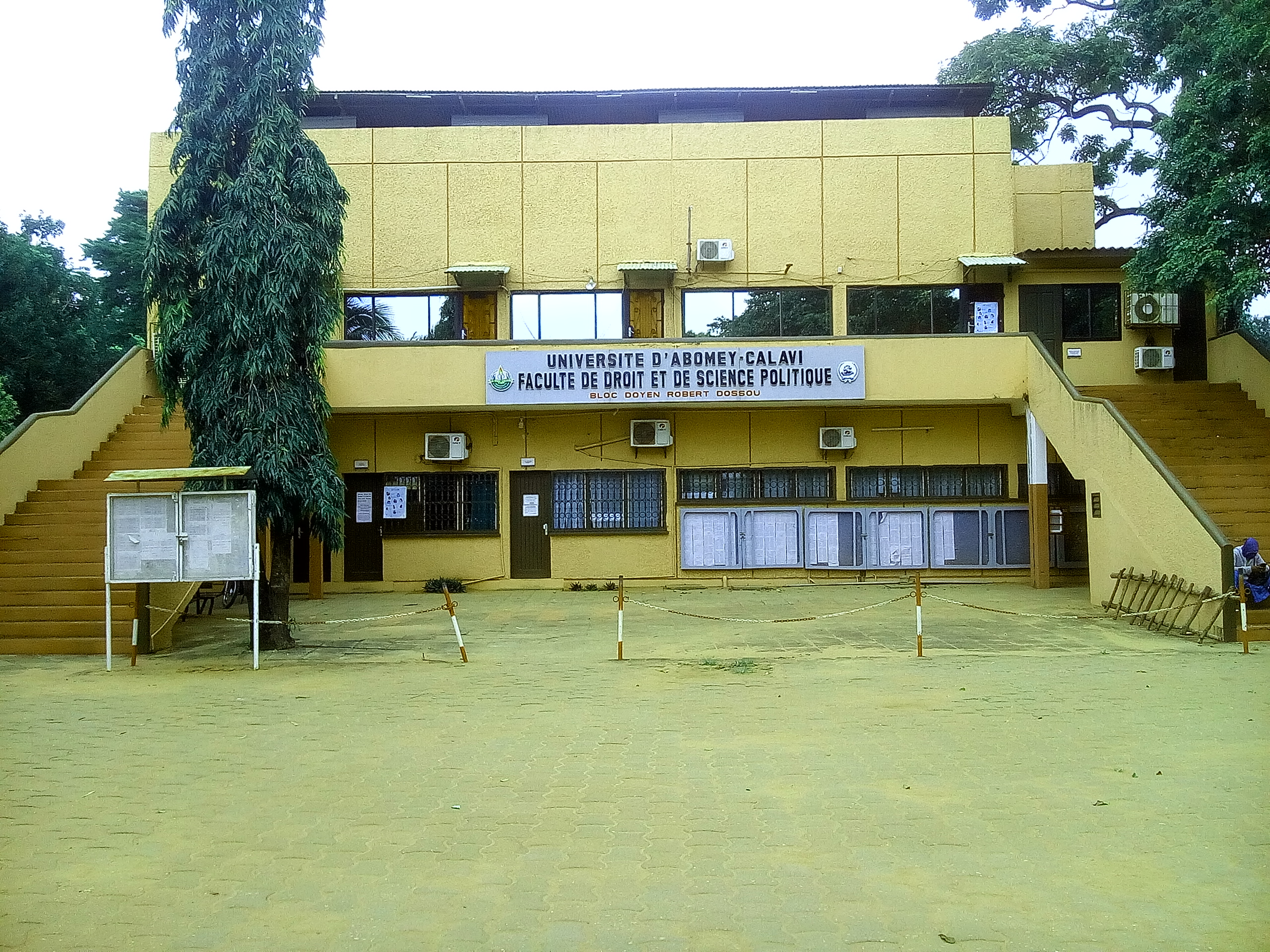 Faculté des droits et science politique Bénin-UAC.